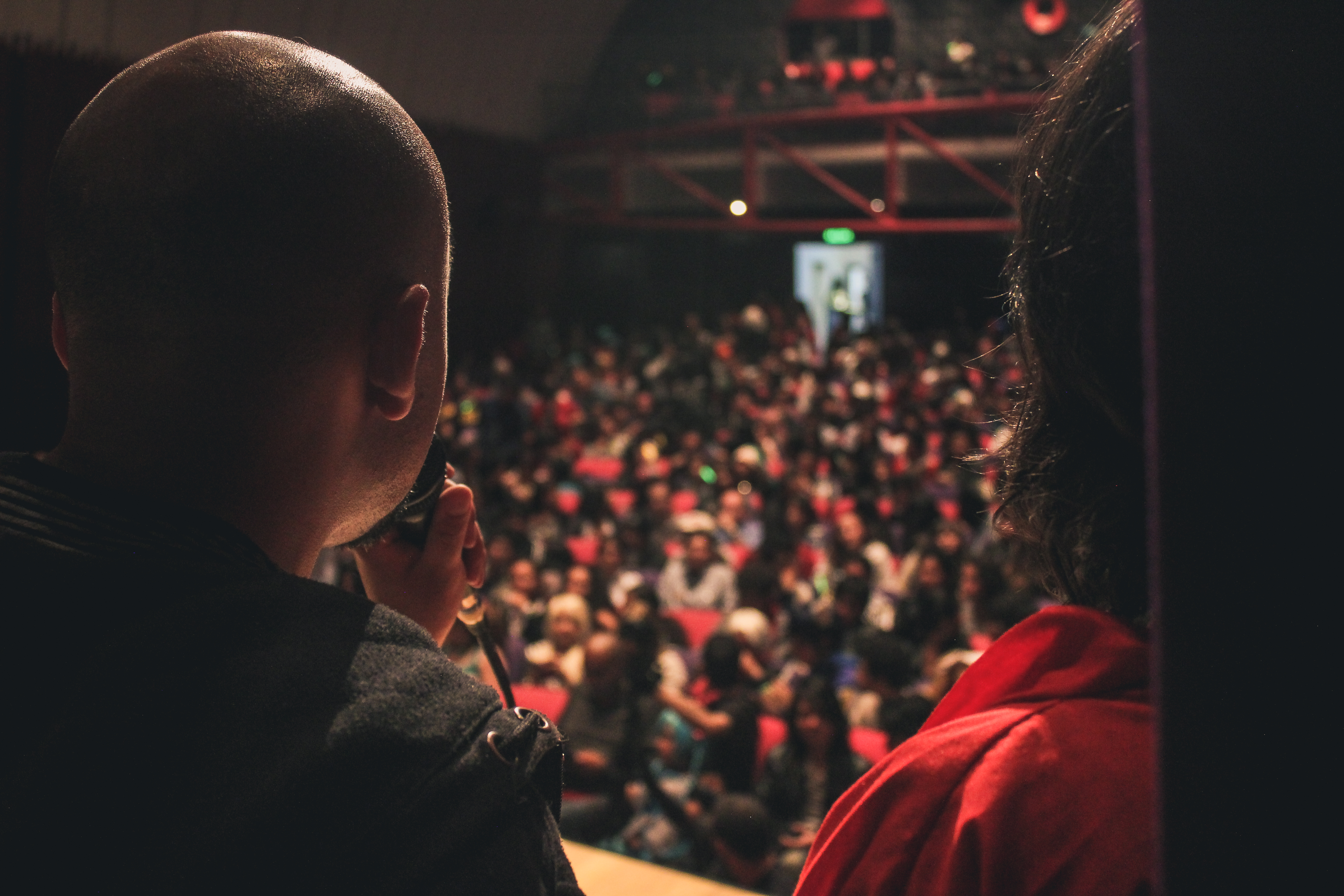 Tokyo Impact! Festival 2 foto 2